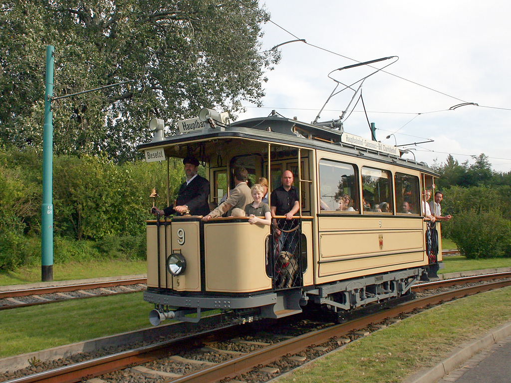 Historischer Triebwagen Nr. 9 der Elektrischen Straßenbahn. Baujahr 1907. Rekonstruiert in den Jahren 2006 bis 2011 auf Basis der Güterlore 311.